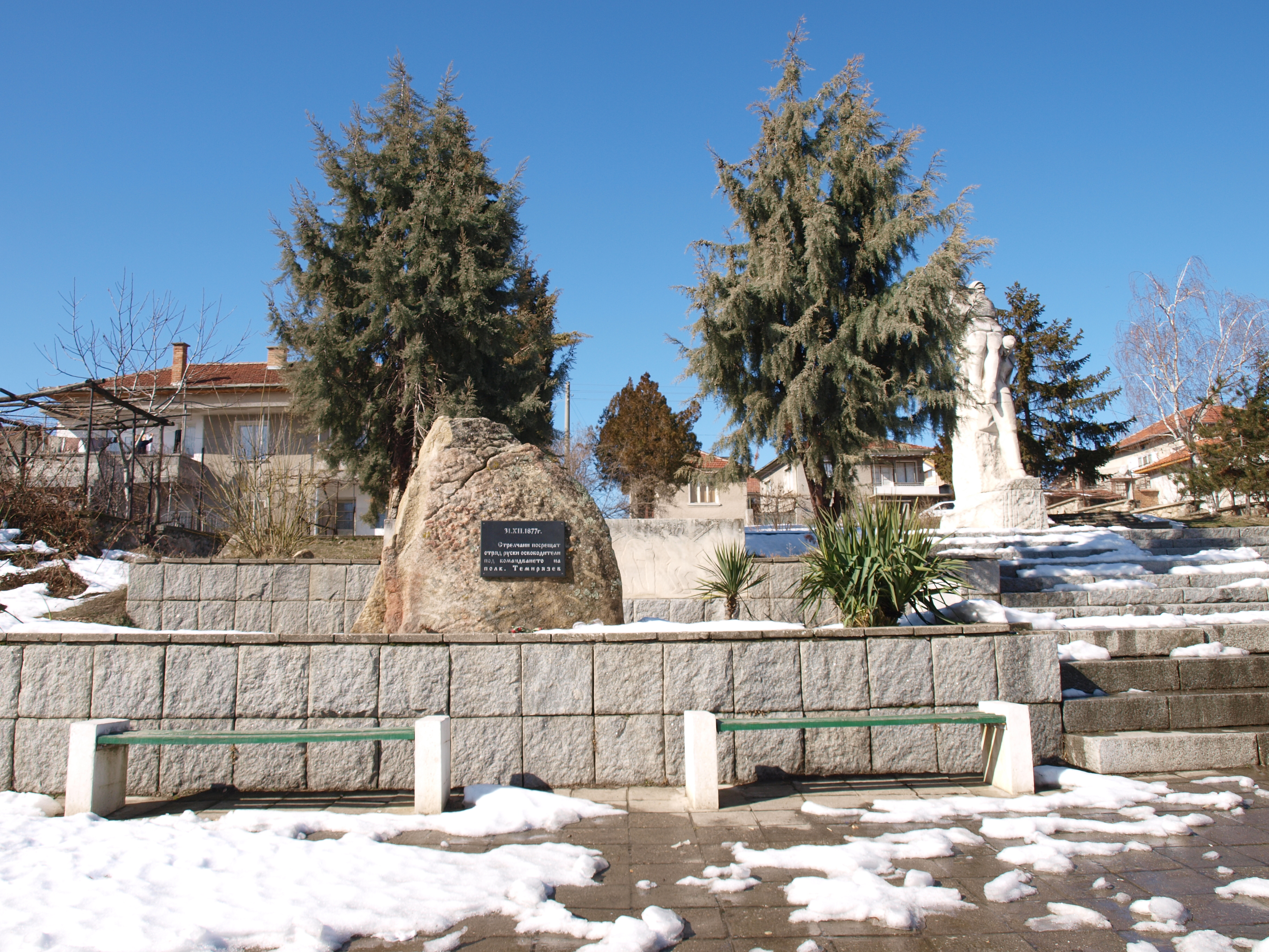 Паметника на руските освободители в Стрелча